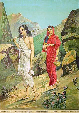 Satyavan Savitr